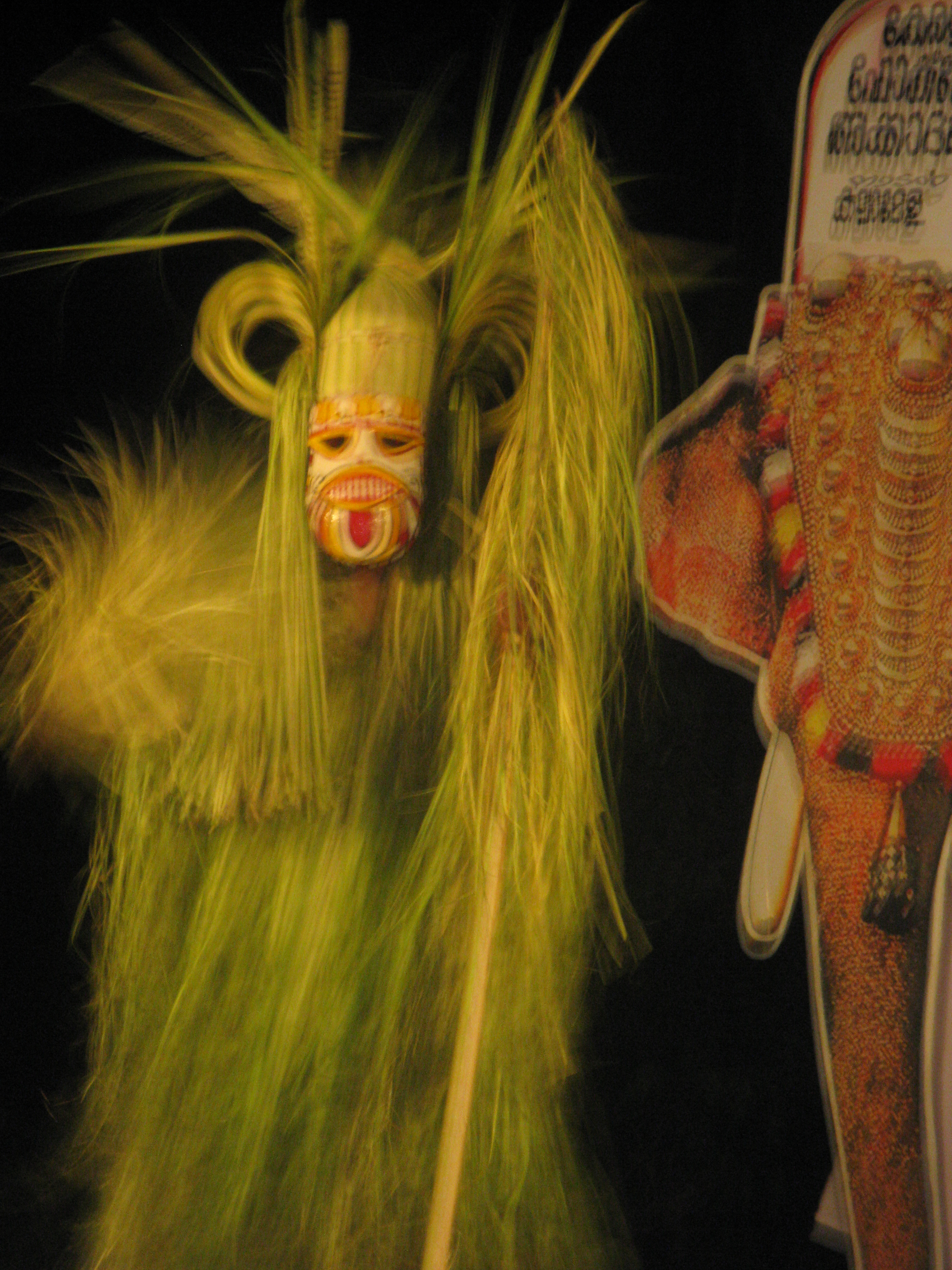 മാടായിയിലും പരിസരപ്രദേശങ്ങളിലും ശനിബാധ ഒഴിപ്പിക്കാൻ കെട്ടിയാടുന്ന വീടോടിത്തെയ്യമായ മാരിത്തെയ്യങ്ങൾ